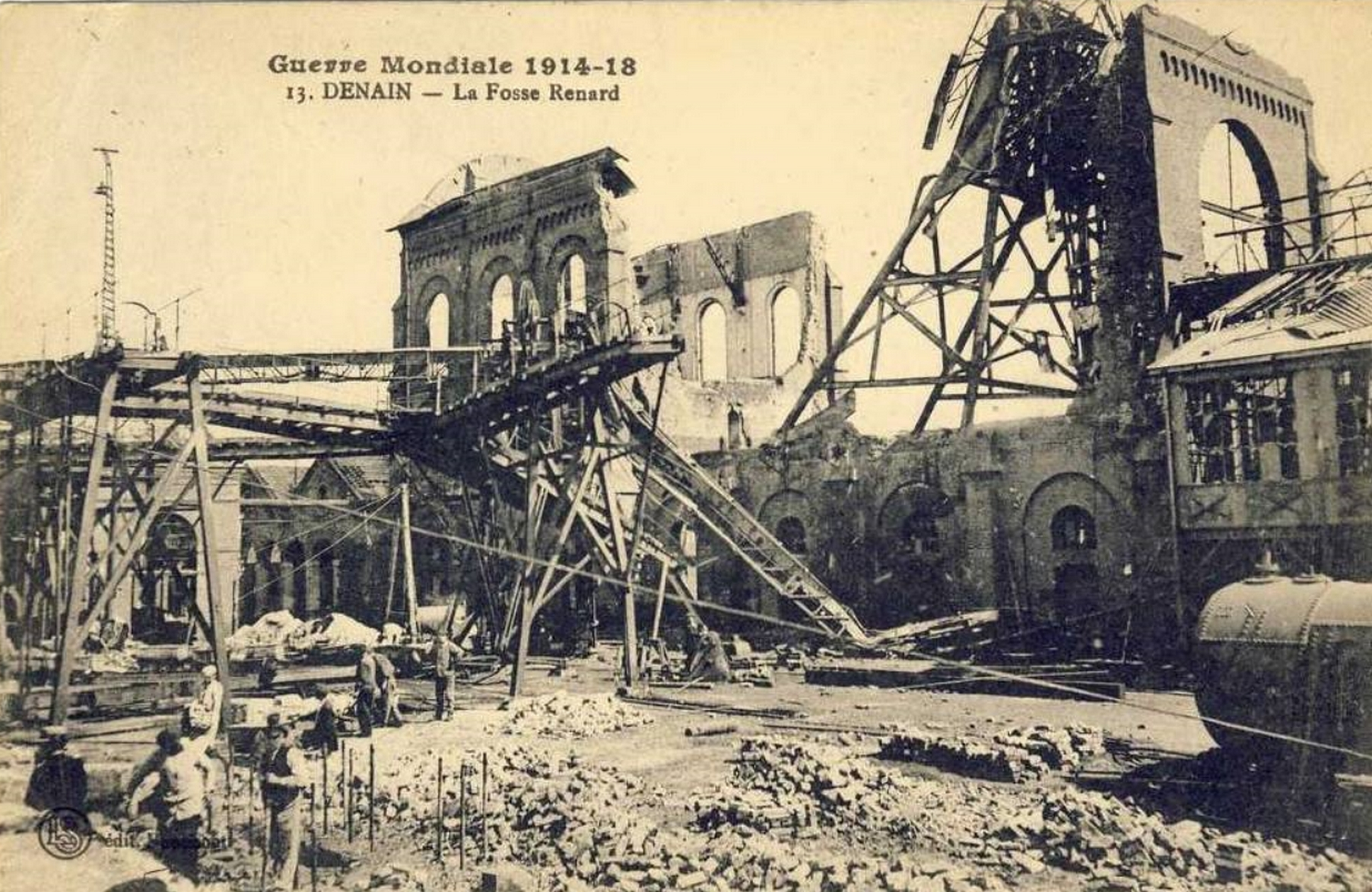 Fosse Renard de la Compagnie des mines d'Anzin, Denain, Nord, Nord-Pas-de-Calais, France.